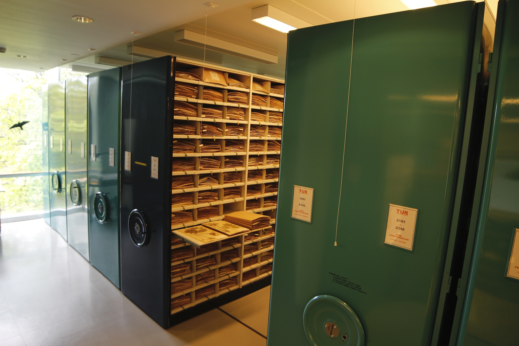 Turun yliopiston kasvimuseon kokoelmia